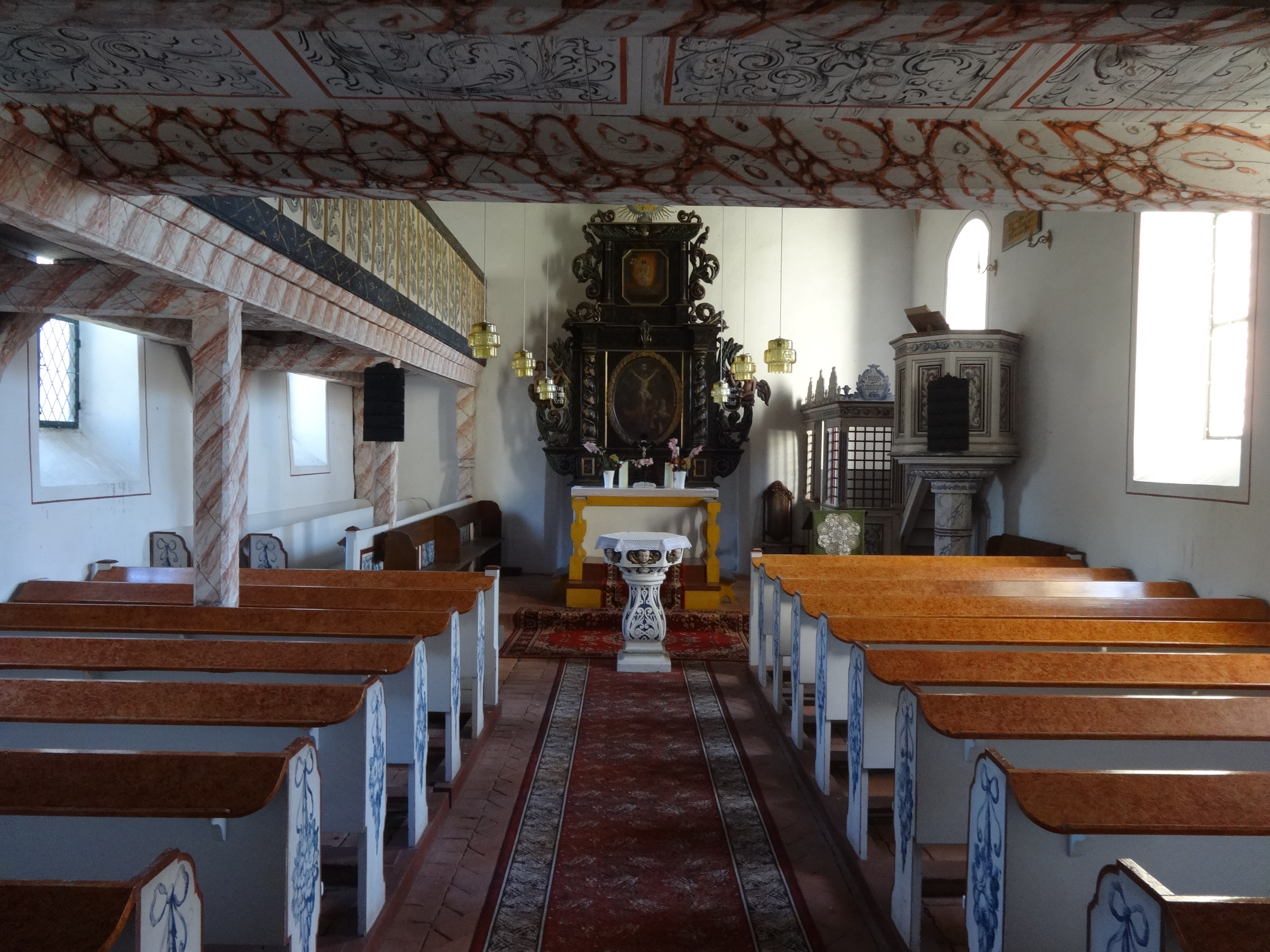 Die evangelische Dorfkirche Prensdorf ist ein Sakralbau in Prensdorf, einem Ortsteil der Gemeinde Dahmetal im Landkreis Teltow-Fläming in Brandenburg.